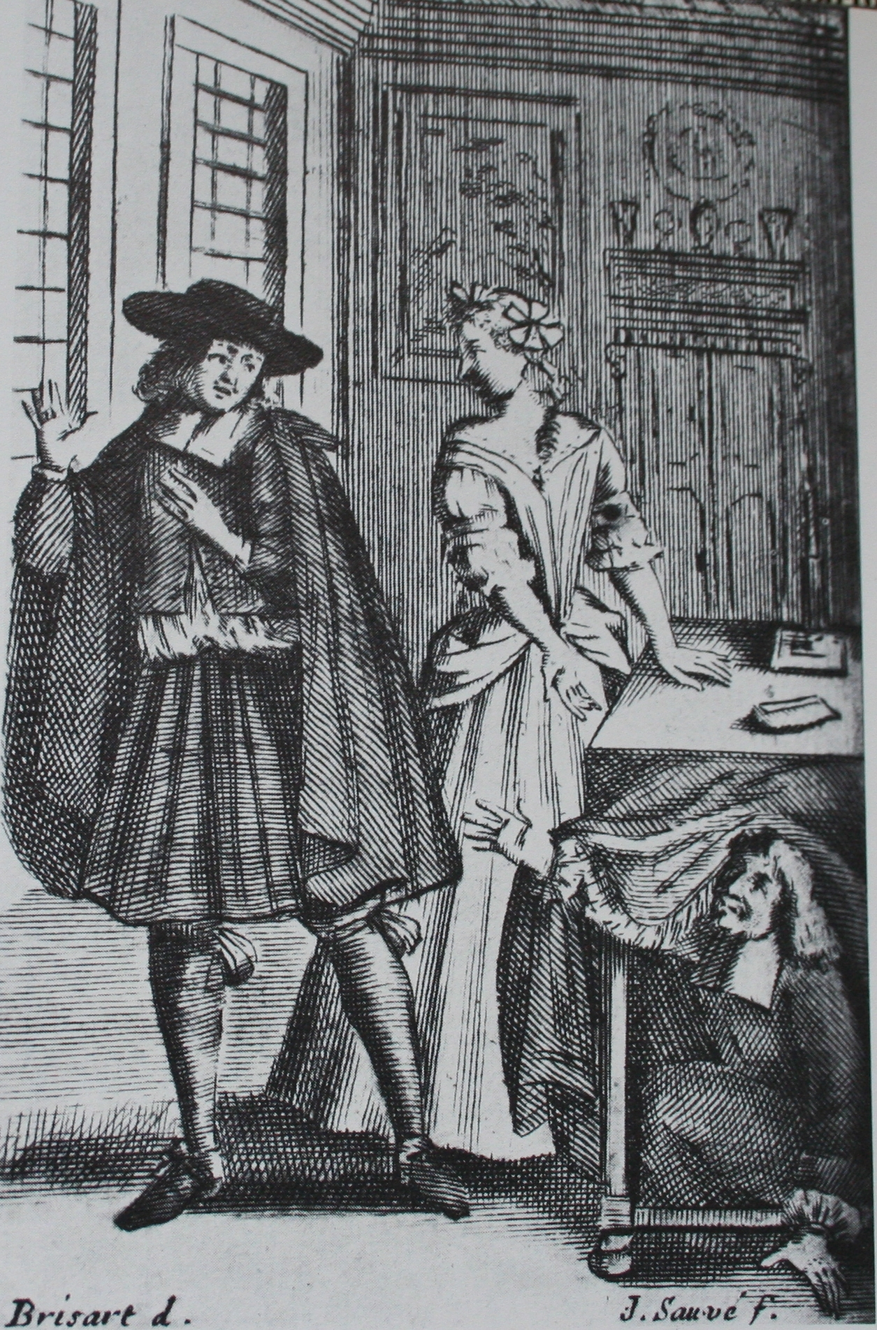 Frontispice de la première édition des oeuvres complètes de Monsieur de Molière (1682) par Pierre Brissart. Bibliothèque nationale.